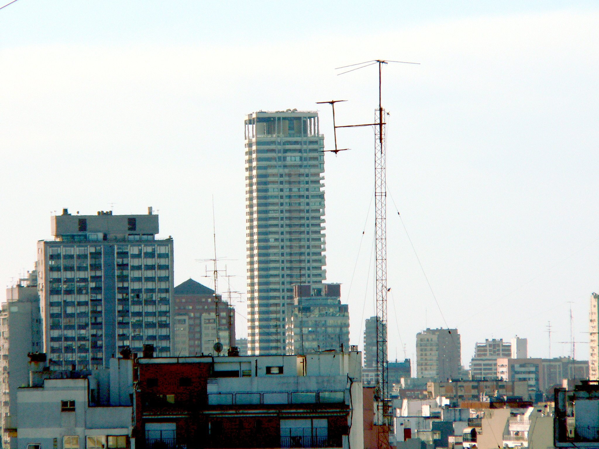 Foto del edificio Le parc tomada desde el barrio de recoleta